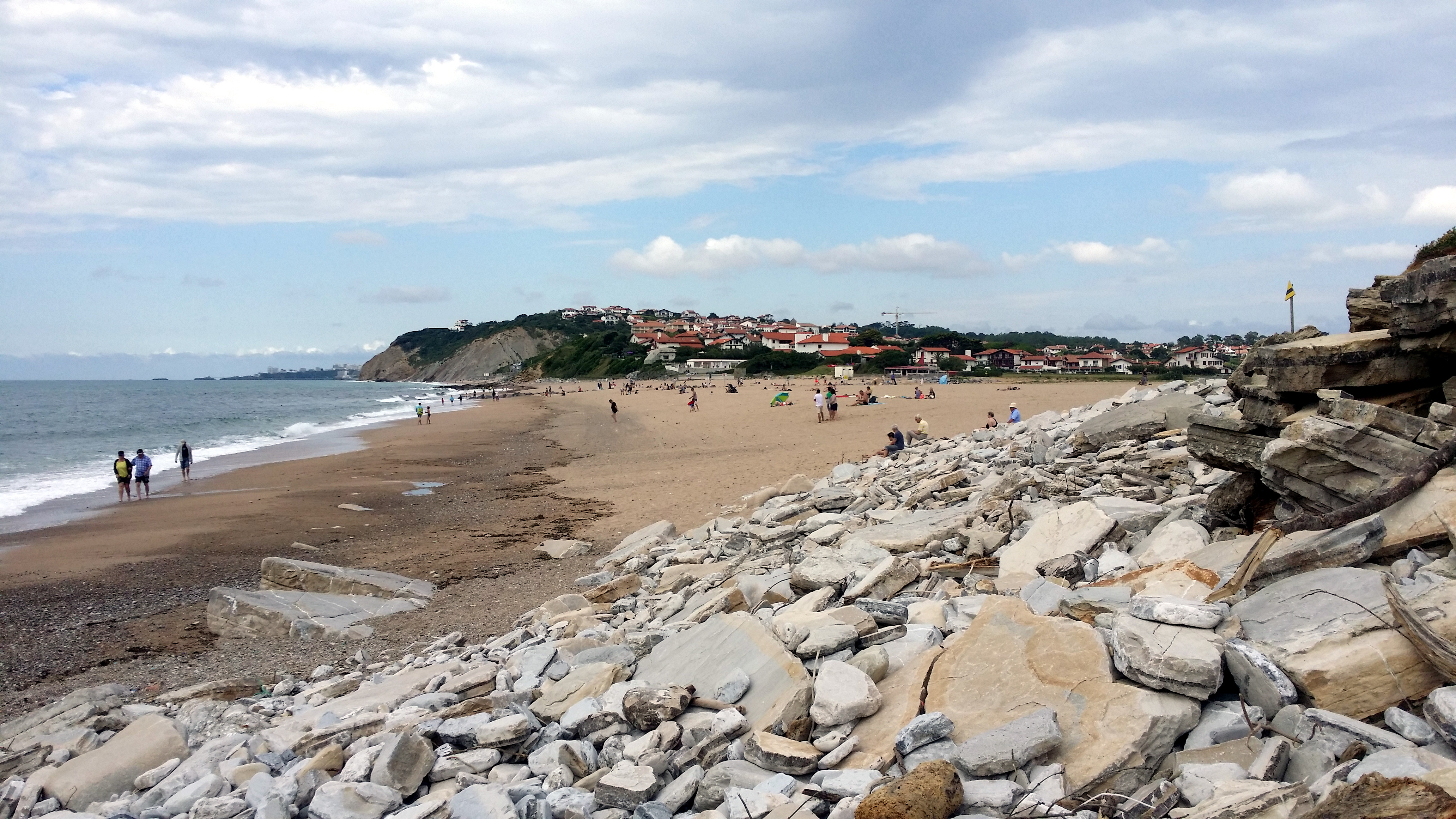 Plage de l'Uhabia, Bidart, France